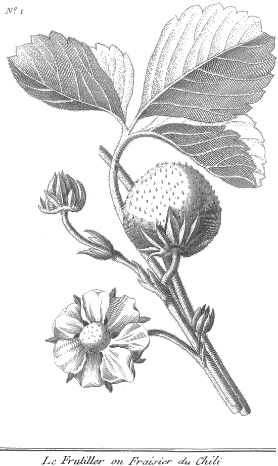 François Rozier, Cours d'agriculture, tome 5, planche 4, figure 1